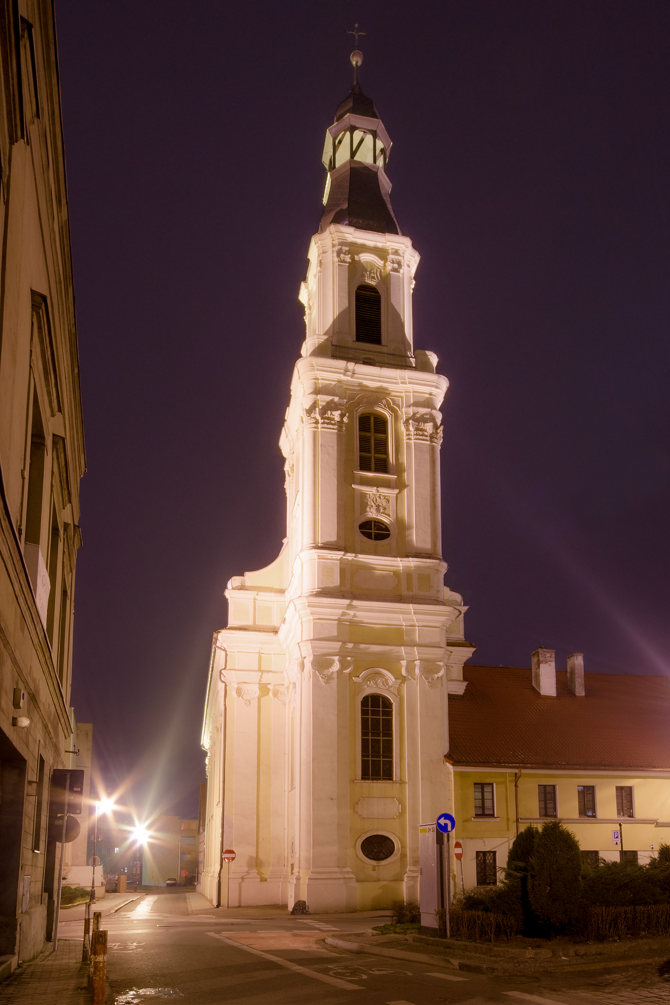 Oleśnica, kościół pom. p.w. Św. Trójcy, 1738-1776